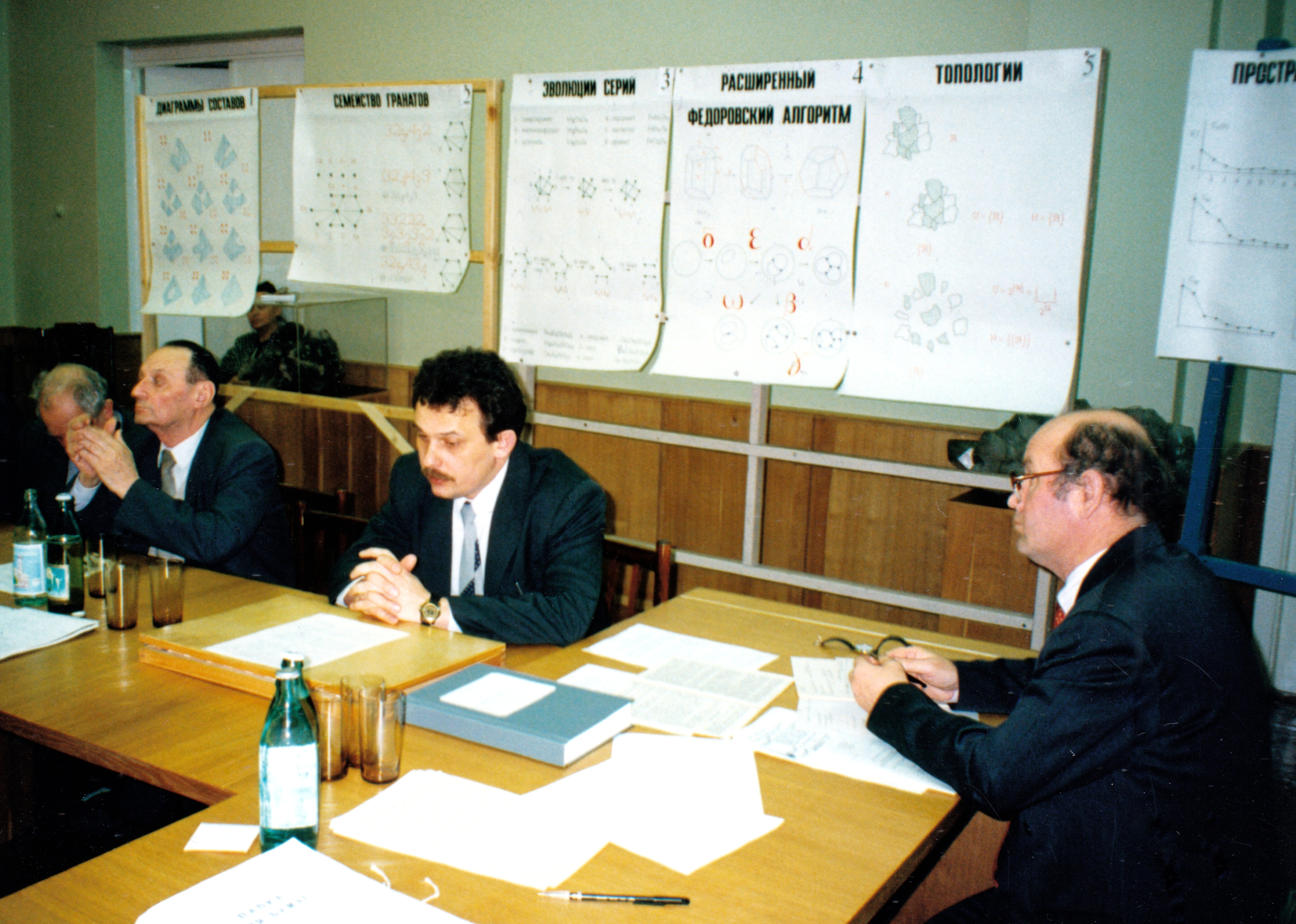 Войтеховский Ю.Л. защита докторской, вдали сидит - Фишман, Марк Вениаминович